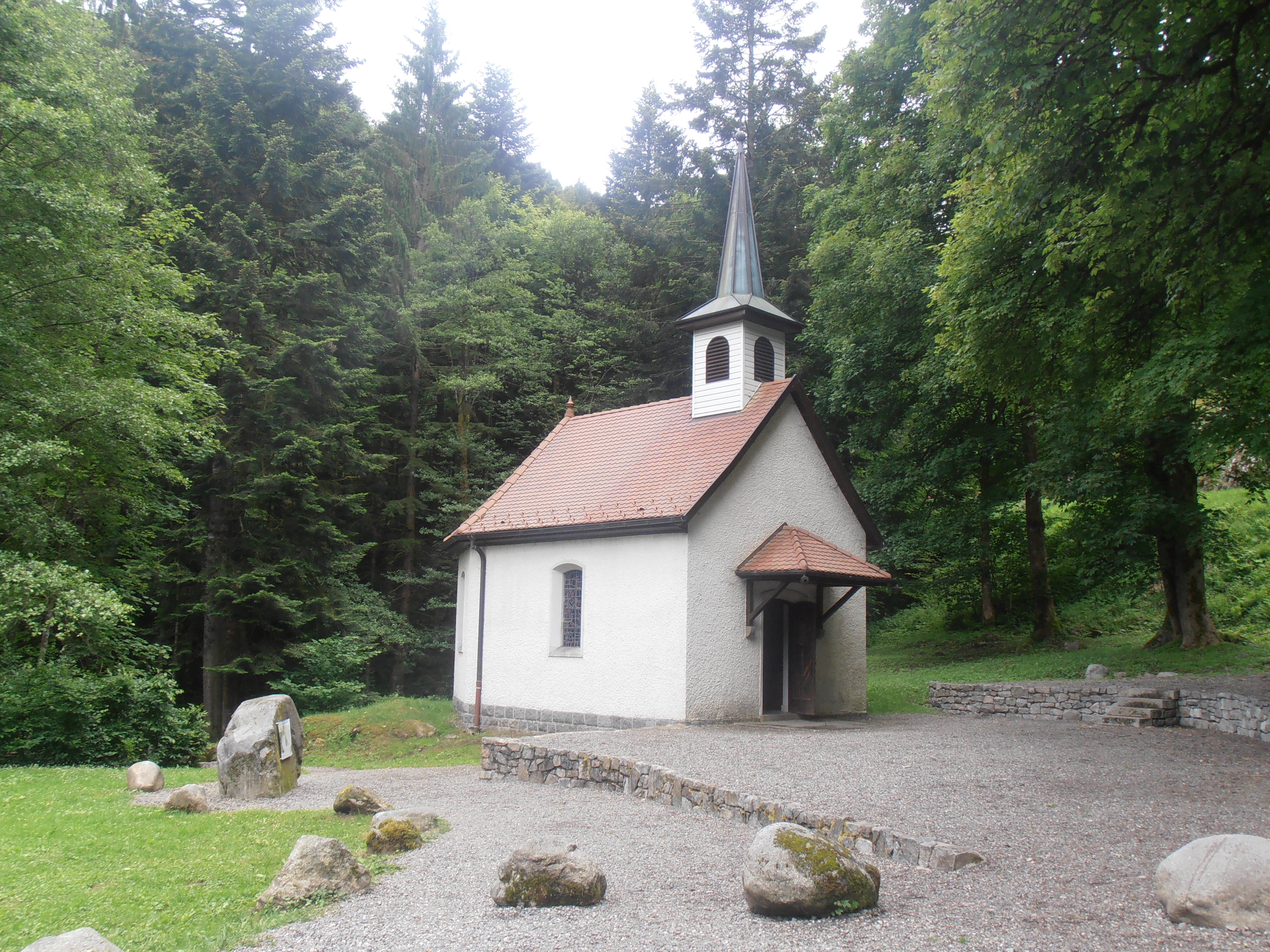 Haut-Rhin-Kruth, Chapelle Saint-Nicolas